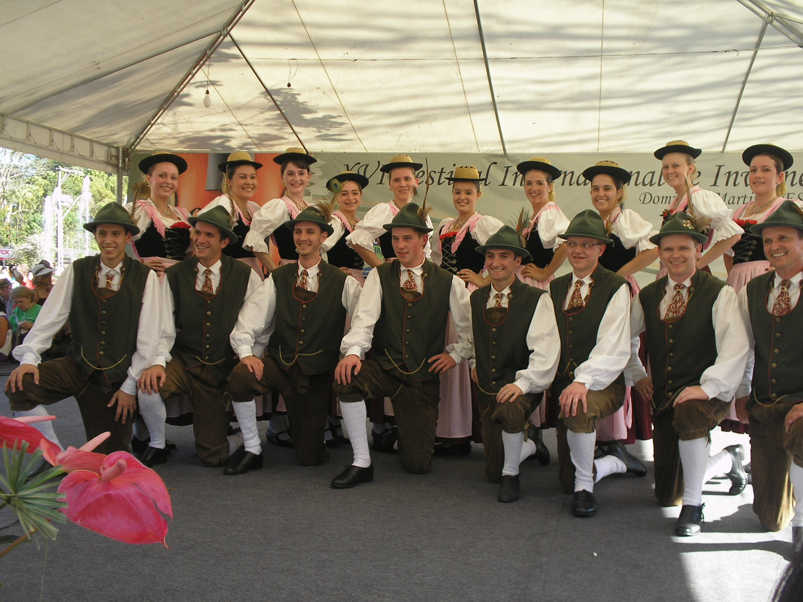 Apresentação Cultural do XVI Festival Internacional de Inverno de Domingos Martins/ES